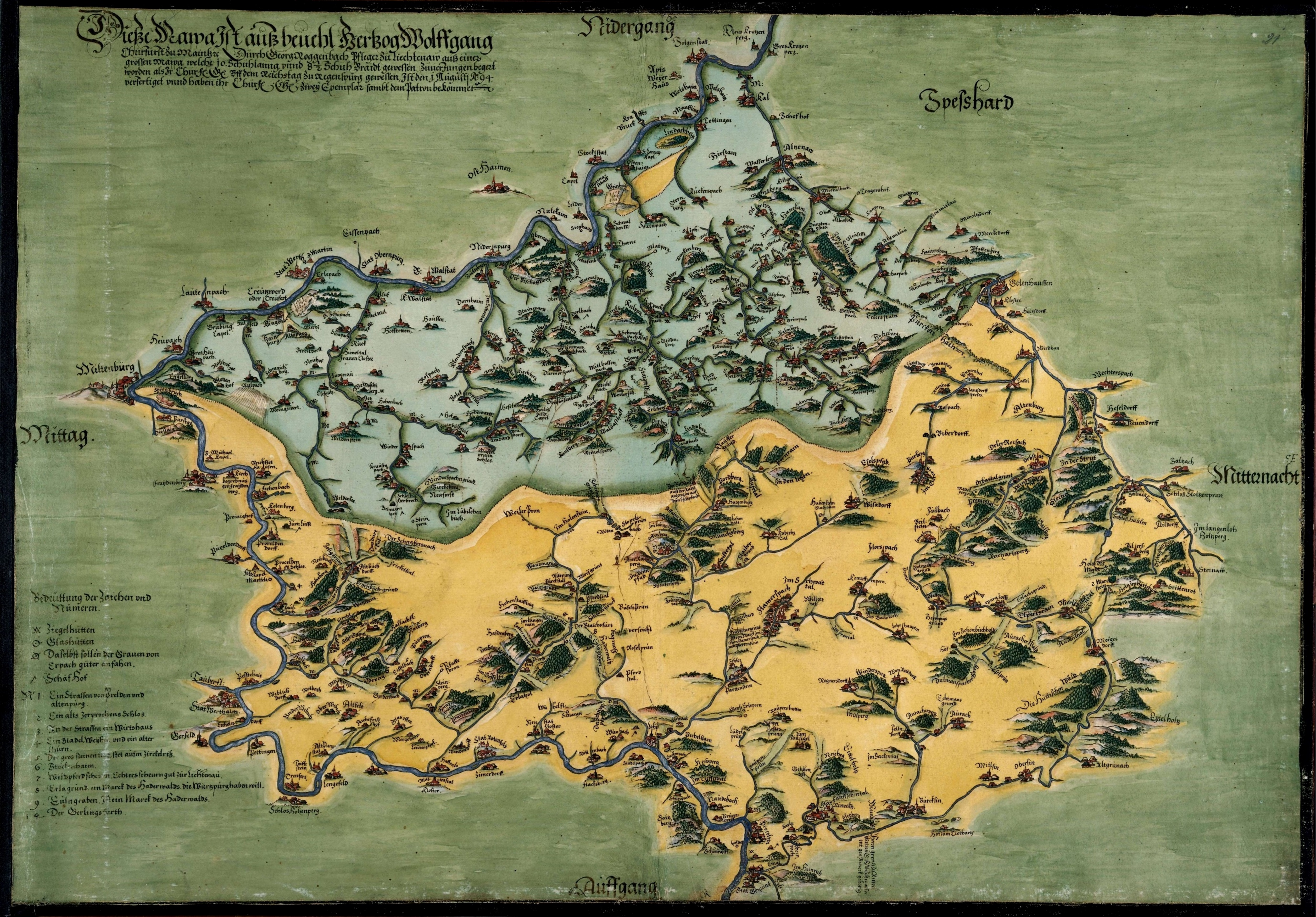 Historische Karte des Spessarts (1562) Seite 41 des "Pfinzing-Atlas von 1594 (leicht beschnitten)